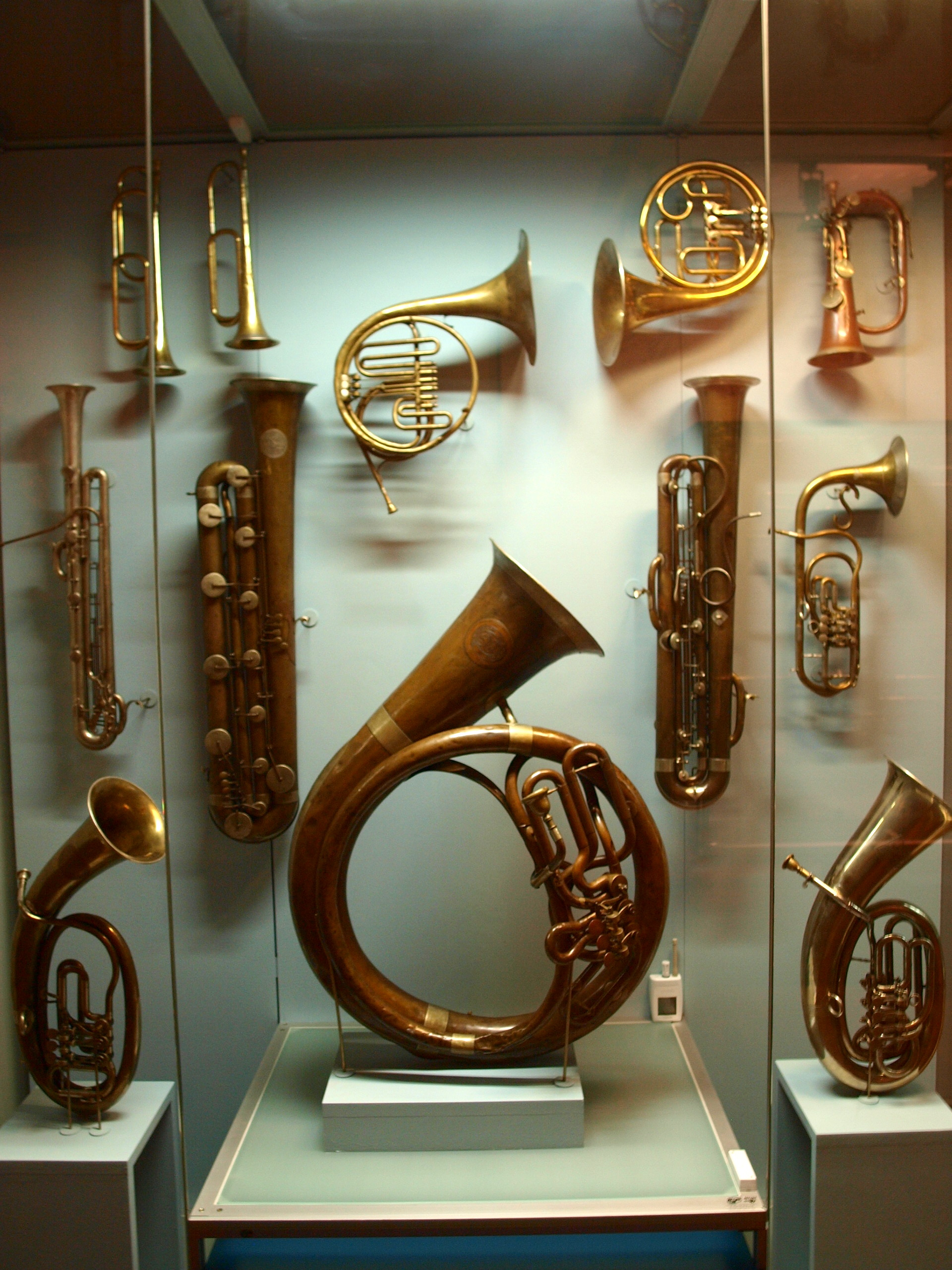 Aerofony, České muzeum hudby